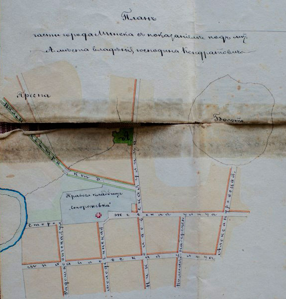 Беларуская (тарашкевіца): Менск (Miensk), Пярэспа (Piarespa) і Старажоўка (Staražoŭka)